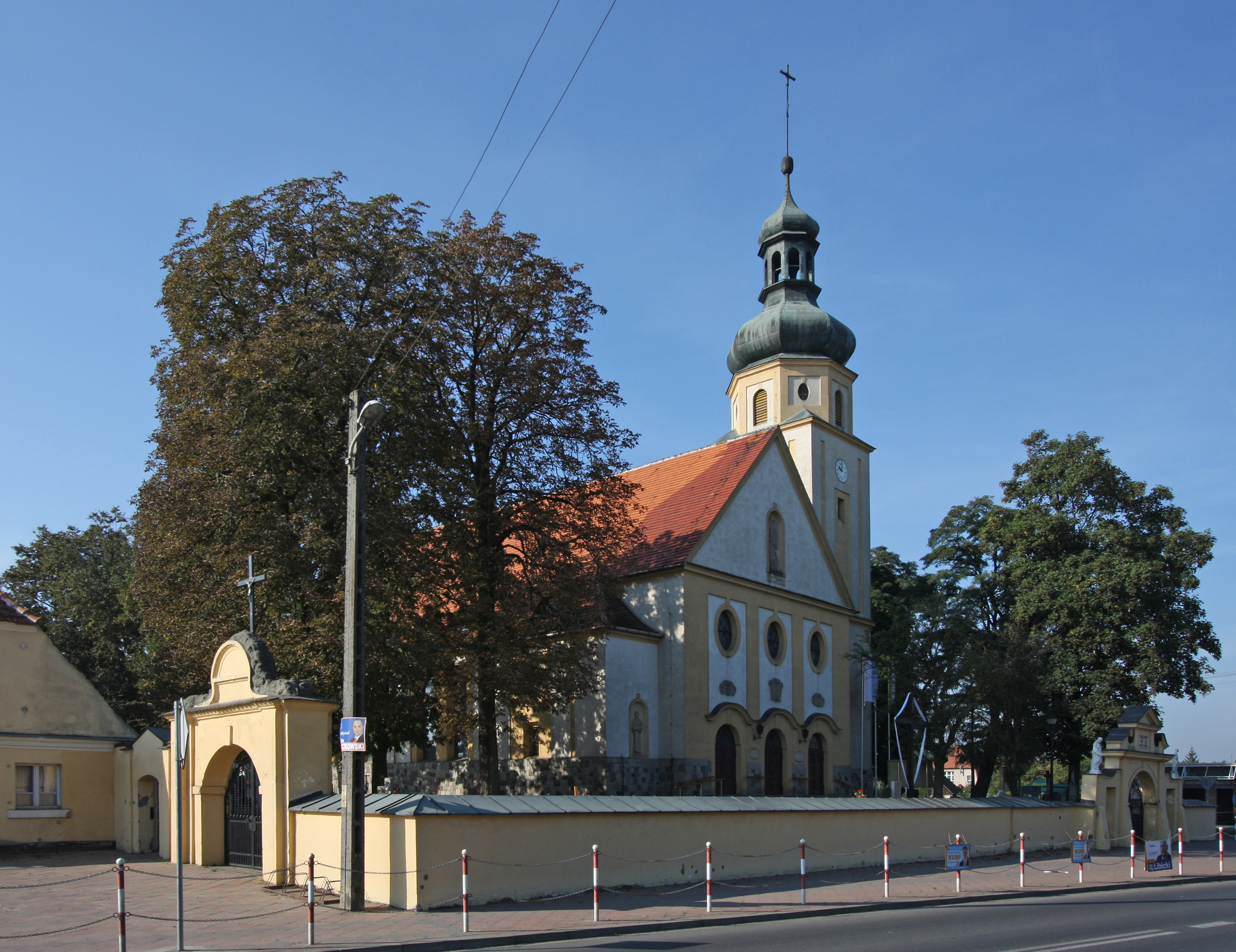 Siedlec, Kościół św. Michała Archanioła, mur., 1911-1913